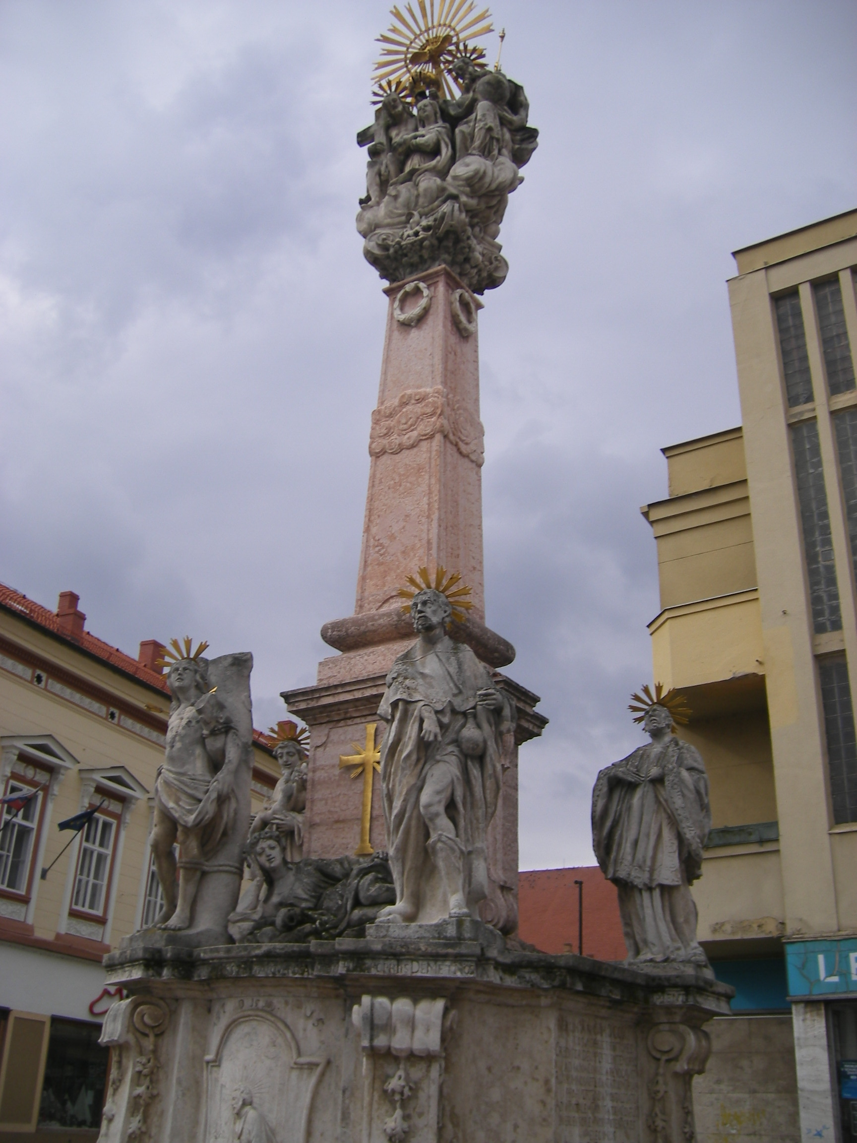 Komárom - Szentháromság-szobor